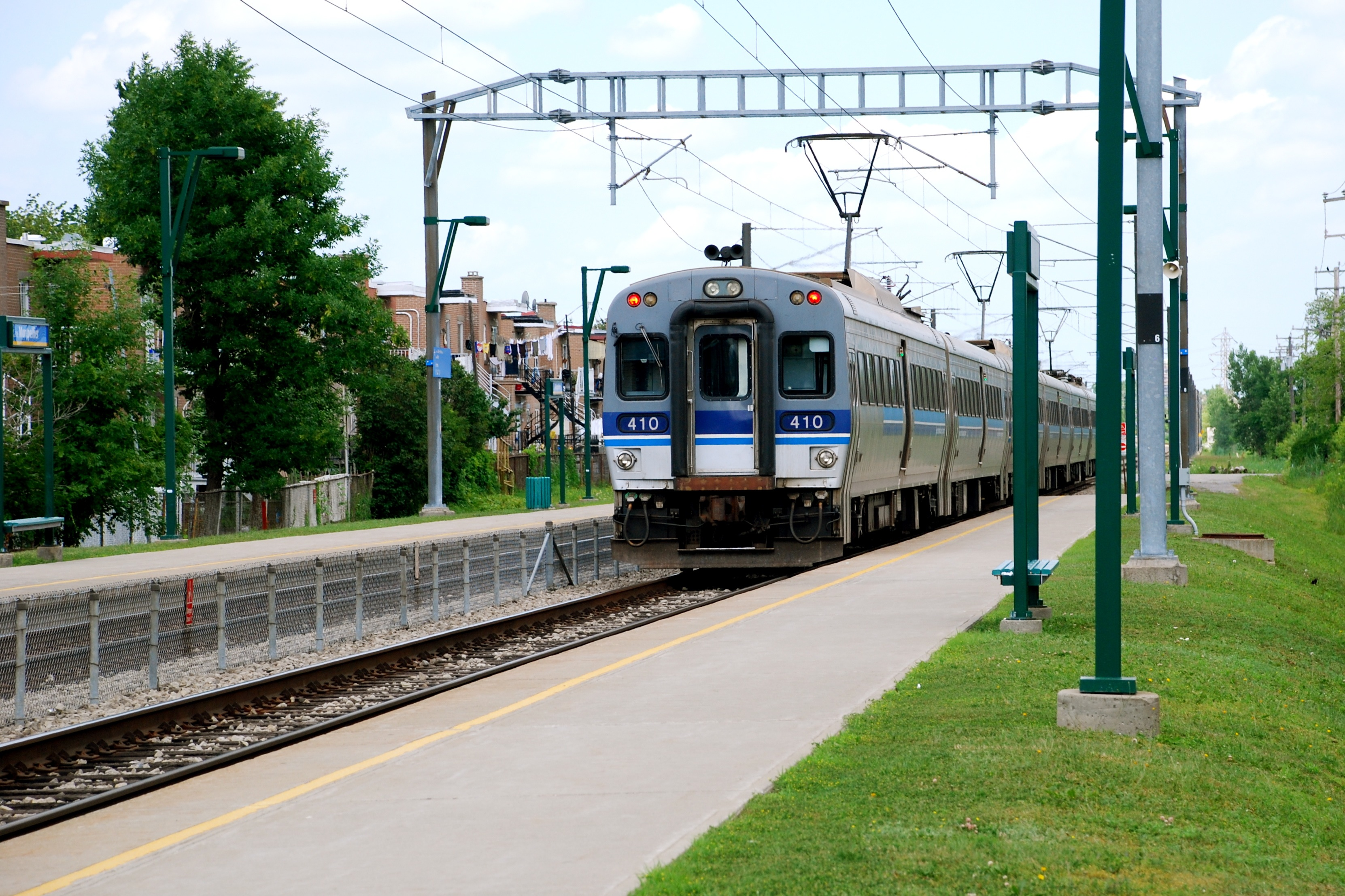 AMT Deux Montages train, gare Montpellier